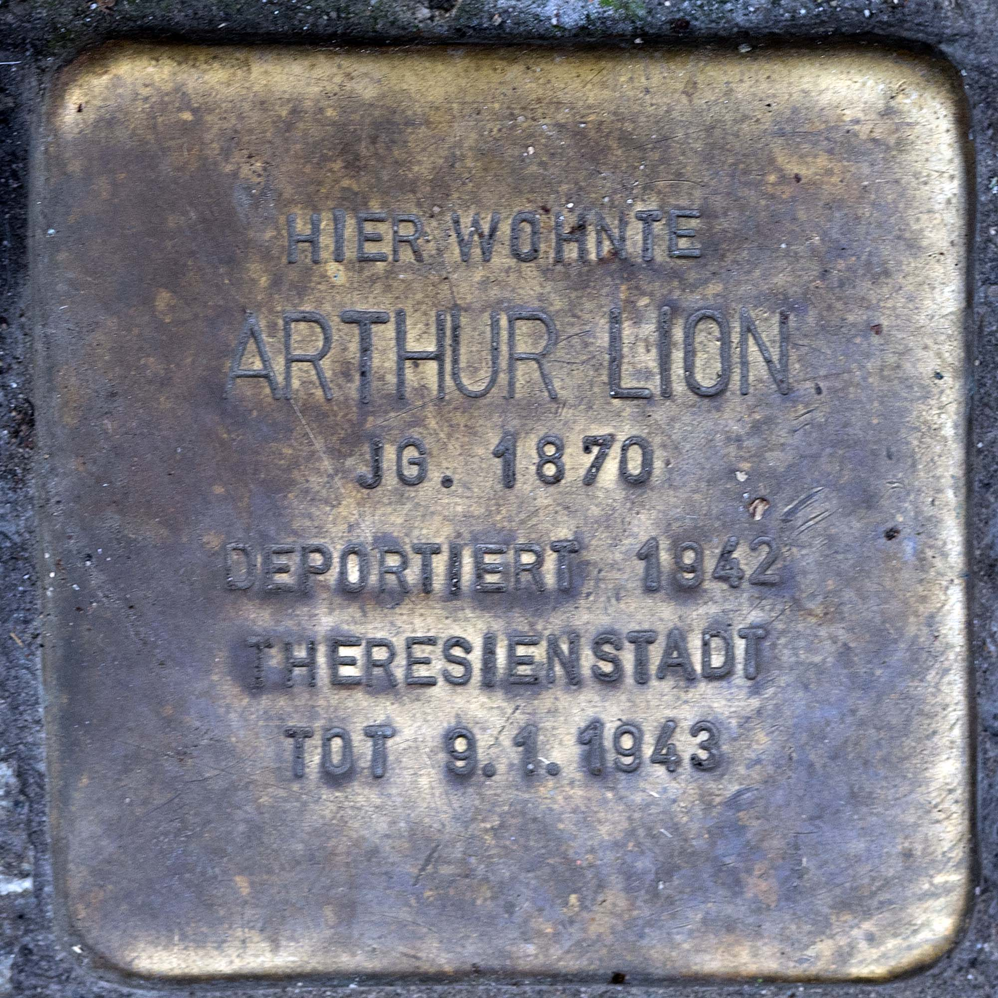 Stolperstein für Lion Albert